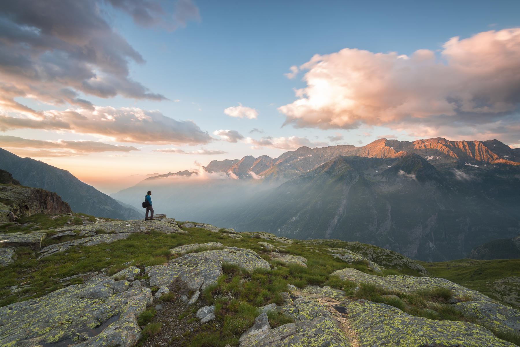 I was seeing the dawn near Gran Piano, in the wild Vallone di Ciamousseretto, Valle dell'Orco, Piedmont, Parco nazionale del Gran Paradiso (Q847690)